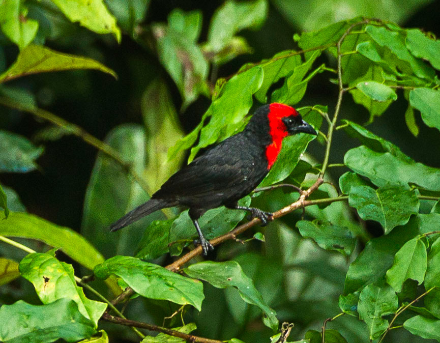 Crested Malimbe - Kakum - Ghana_S4E1412